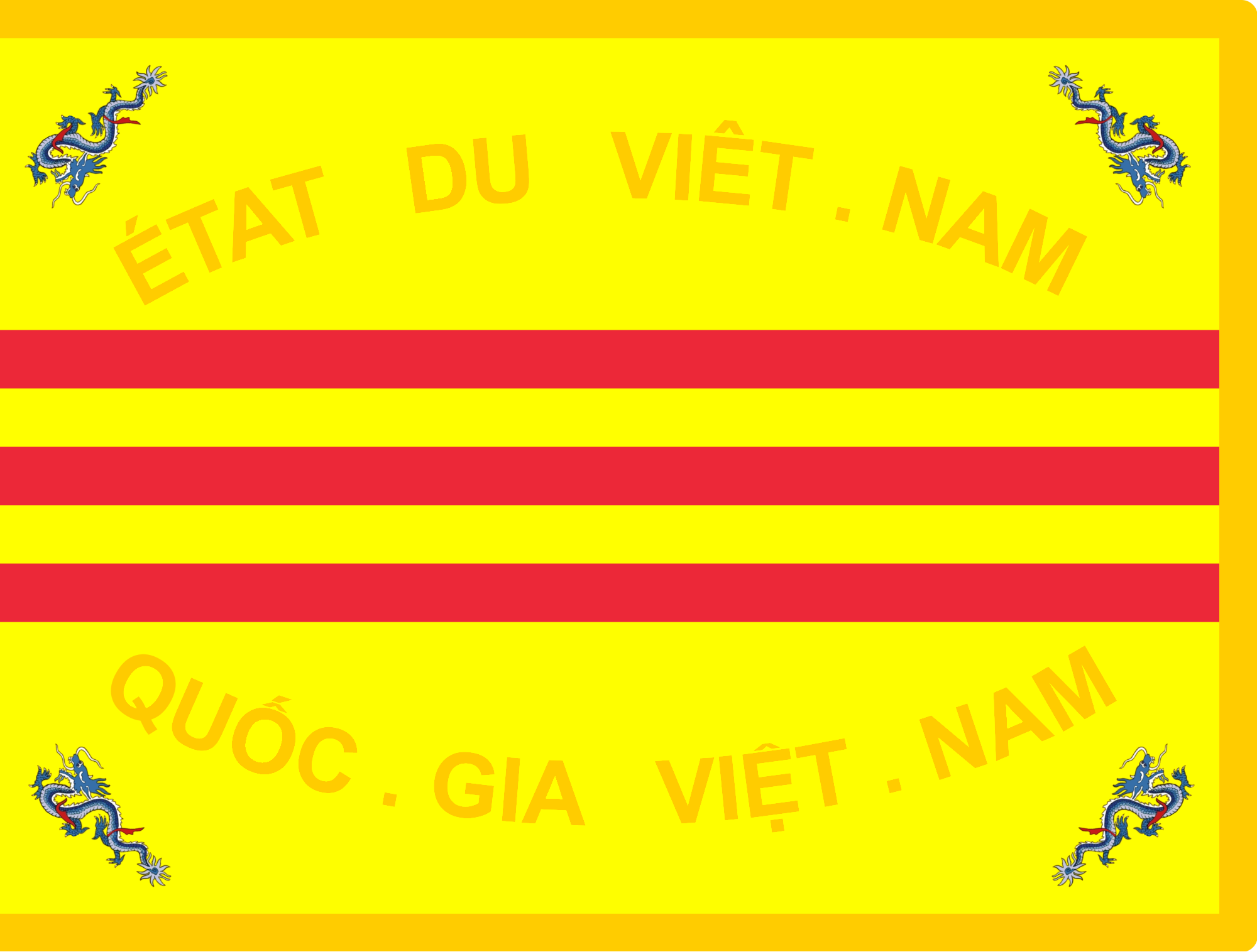 The flag of Vietnamese National Army (Armée Nationale Vietnamienne / Quân đội Quốc gia Việt Nam), used since 1950 to 1955.